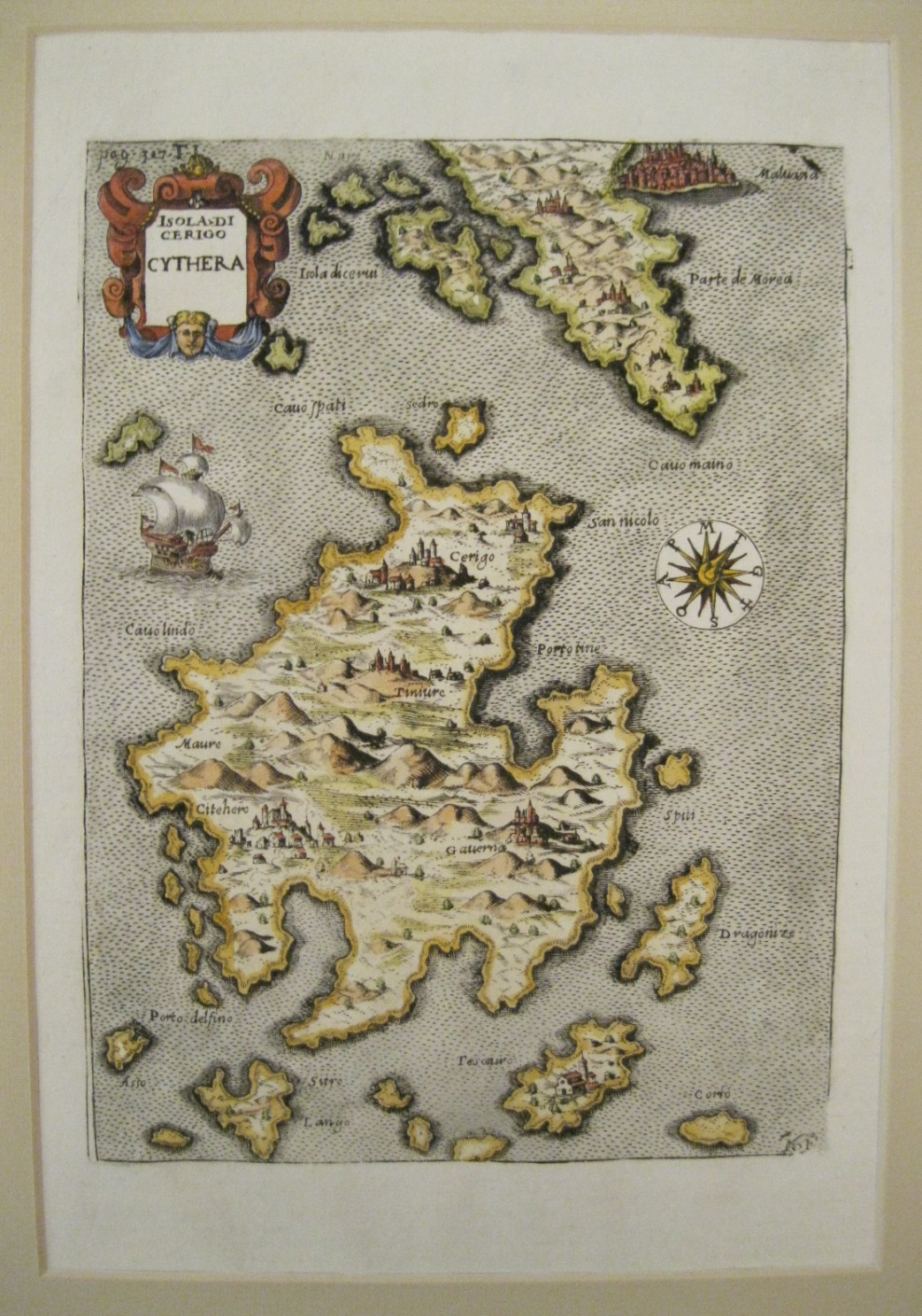 Kupferstich mit Karte der griechischen Insel Kythera (Cerigo), moderne Handkolorierung